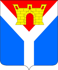 Герб Усть-Лабинского городского поселение Дата принятия: 02.02.2010 Номер в Геральдическом регистре РФ: 5926 Описание: В лазоревом поле серебряный вилообразный крест, вверху заполненный червленью, и поверх всего, в главе – золотое, мурованное чёрным, укрепление в виде одноярусной башни с тремя видимыми зубцами, со сквозными аркой ворот и бойницами в зубцах. Обоснование символики: Герб и флаг языком символов и аллегорий отражают исторические, культурные и экономические особенности городского поселения. Изображение укрепления в виде одноярусной башни указывает на Александровскую крепость, основанную под руководством А.В. Суворова, вокруг которой, впоследствии, выросла станица, а затем районный центр – город Усть-Лабинск. Открытые ворота символизируют гостеприимство и радушие жителей городского поселения. Золото – символ достатка, стабильности, почёта. Серебряный вилообразный крест аллегорически указывает на место слияния двух рек – Кубани и Лабы, где и располагается город Усть-Лабинск. Серебро - символ простоты и ясности, мудрости и мира. Червленый (красный) цвет аллегорически указывает на то, что крепость построена регулярными частями под предводительством А.В. Суворова, а синий цвет является определяющим цветом у донских и линейных казаков и аллегорически указывает на то, что эти казаки со временем сменили регулярные части в крепости, а рядом с крепостью основали станицу Червленый (красный) цвет – символ мужества, красоты, праздника и труда. Лазоревый (синий) цвет – символ чести, добродетели, истины. Авторская группа: идея герба: В. Григоров (Усть-Лабинск), В. Нагаевский (Тихорецк), А. Раков, М. Шарунов (Краснодар); Изображение и обоснование символики: В. Нагаевский (Тихорецк). Утвержден решением Совета муниципального образования Усть-Лабинского городского поселения Усть-Лабинского района (#12 п.5) от 2 февраля 2010 года.